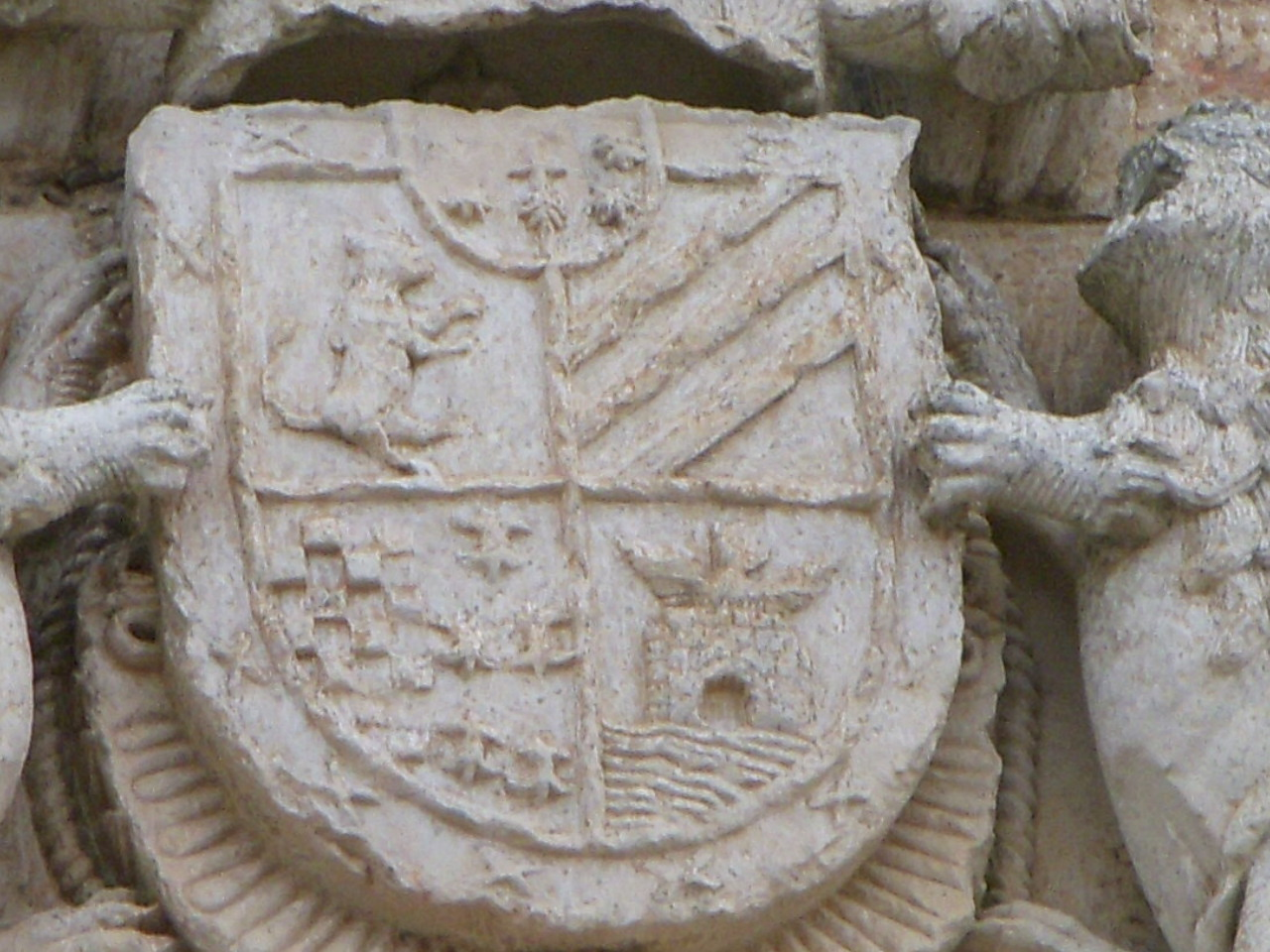 Escudo de De León (Casa Primera)